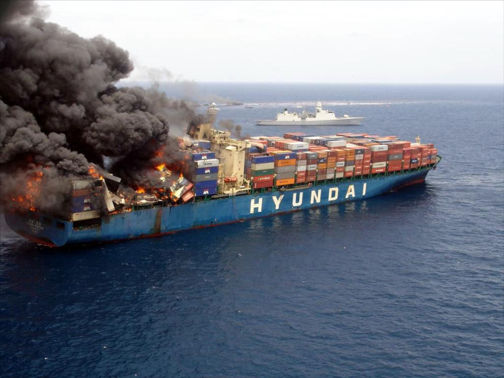 Het containerschip Hyundai Fortune brandt als een fakkel. Op de achtergrond Hr. Ms. De Zeven Provinciën.